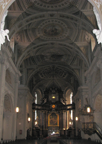 Wallfahrtsbasilika Walldürn